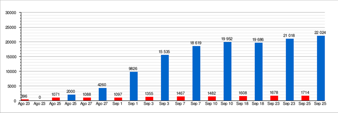 Deportados retornados crisis Venezuela Colombia 2015